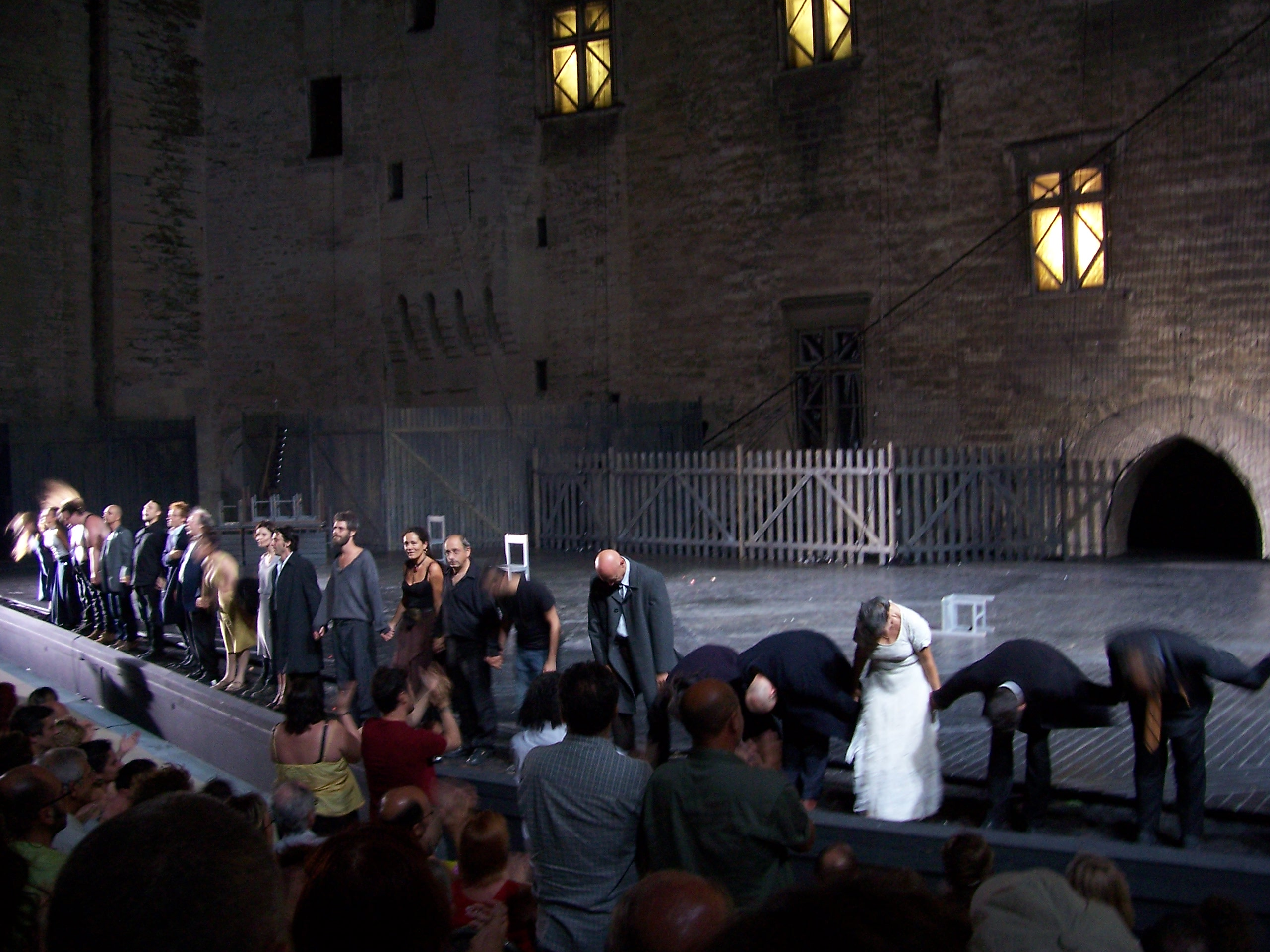 Eric Lacascade au festival d'avignon 2006